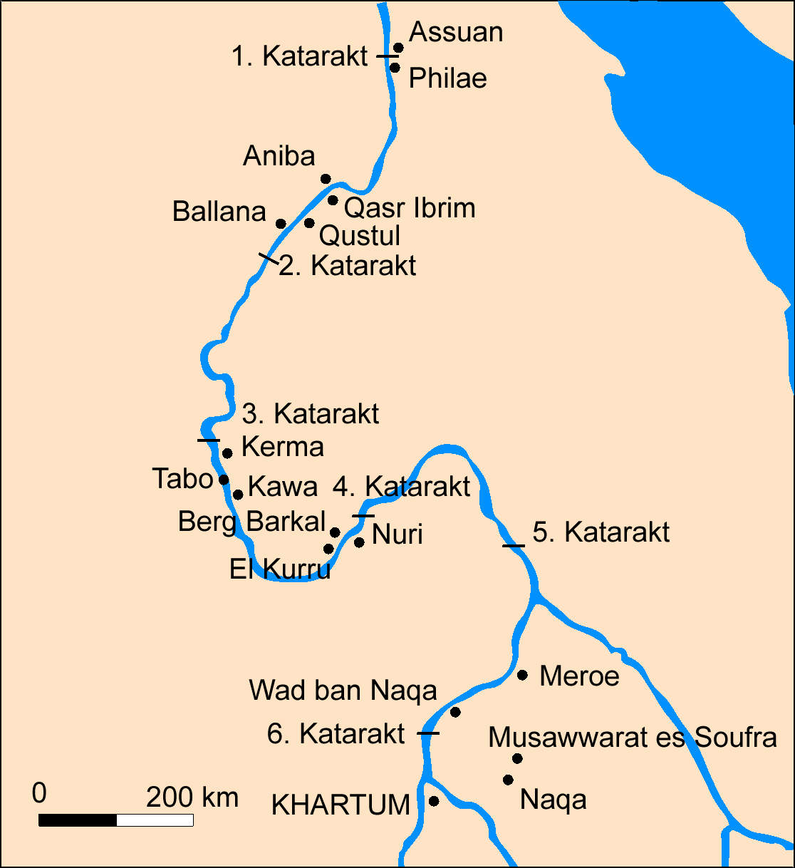 Bildbeschreibung: Karte von Nubien Zeichner: Udimu Datum: 14. April 2006 10:29, 14. Apr 2006 Udimu 1116 x 1218 (167985 Byte) (* Bildbeschreibung: Karte von Nubien * Zeichner: Udimu * Datum: 14. April 2006 )